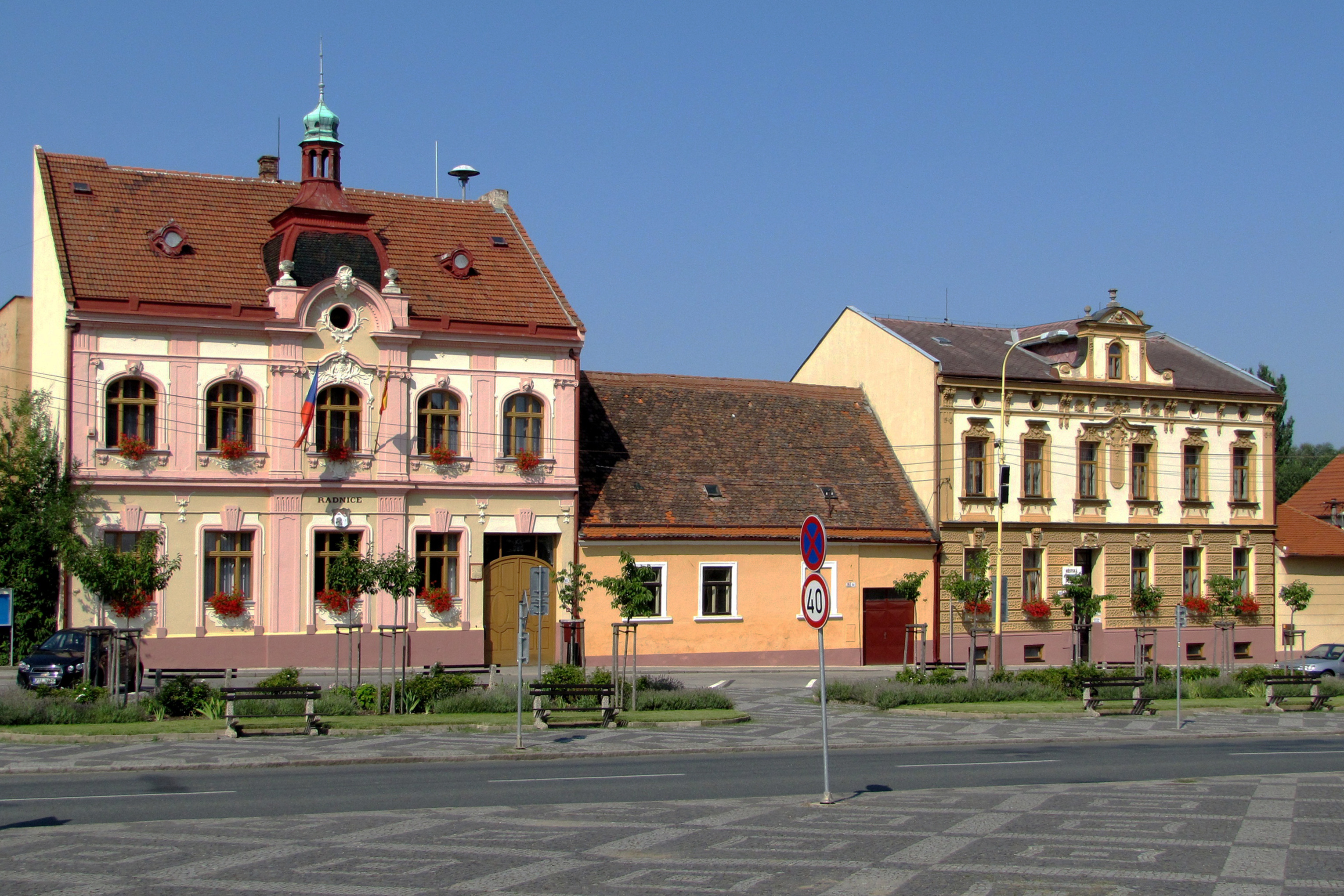 Radnice a budova Městské policie na náměstí Svobody ve Strážnici